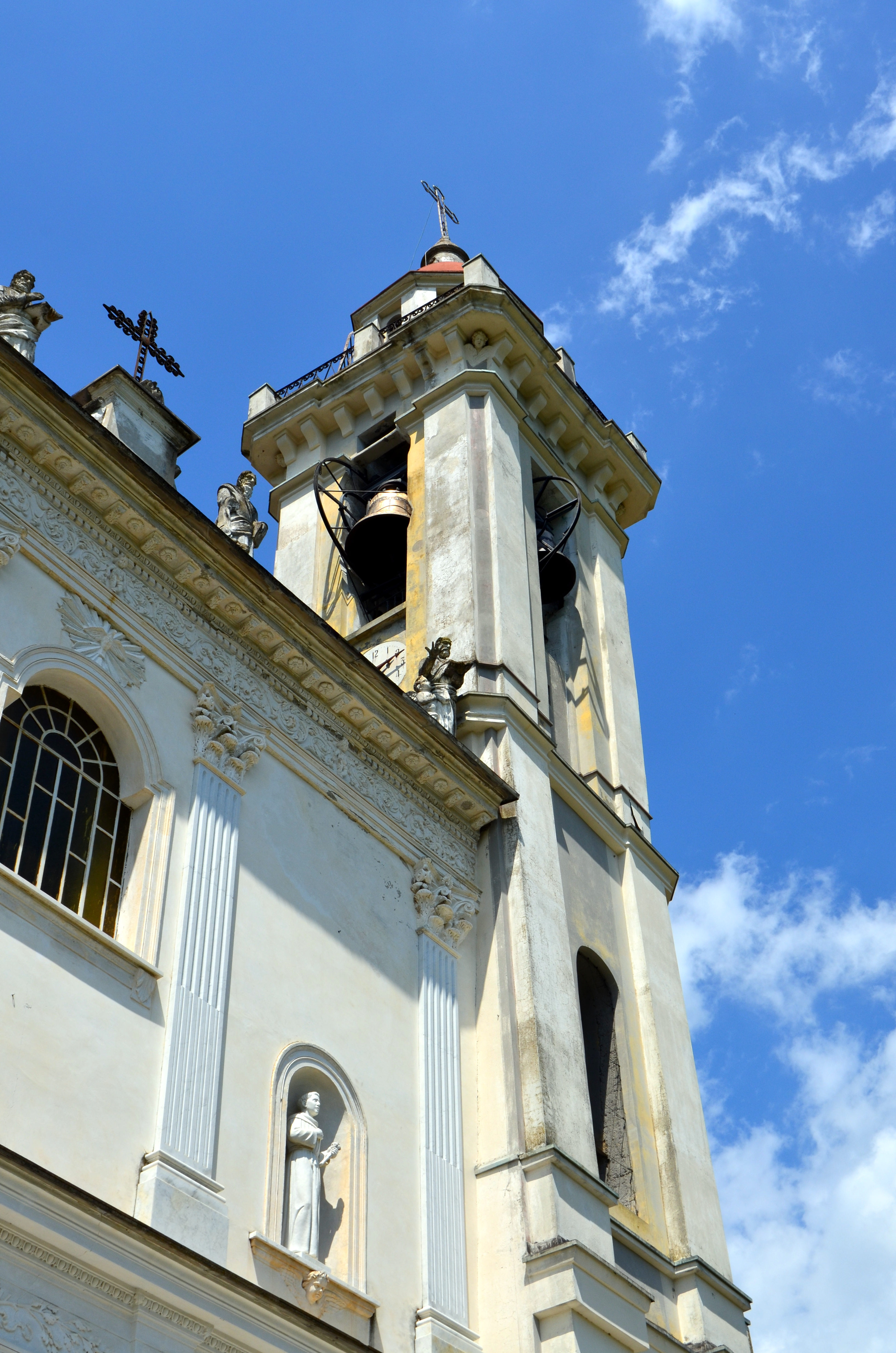 Chiesa di Santa Maria Assunta di Campo di Ne, Ne, Liguria, Italia